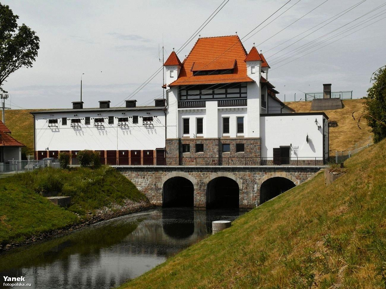 Budynek elektrowni w Straszynie.